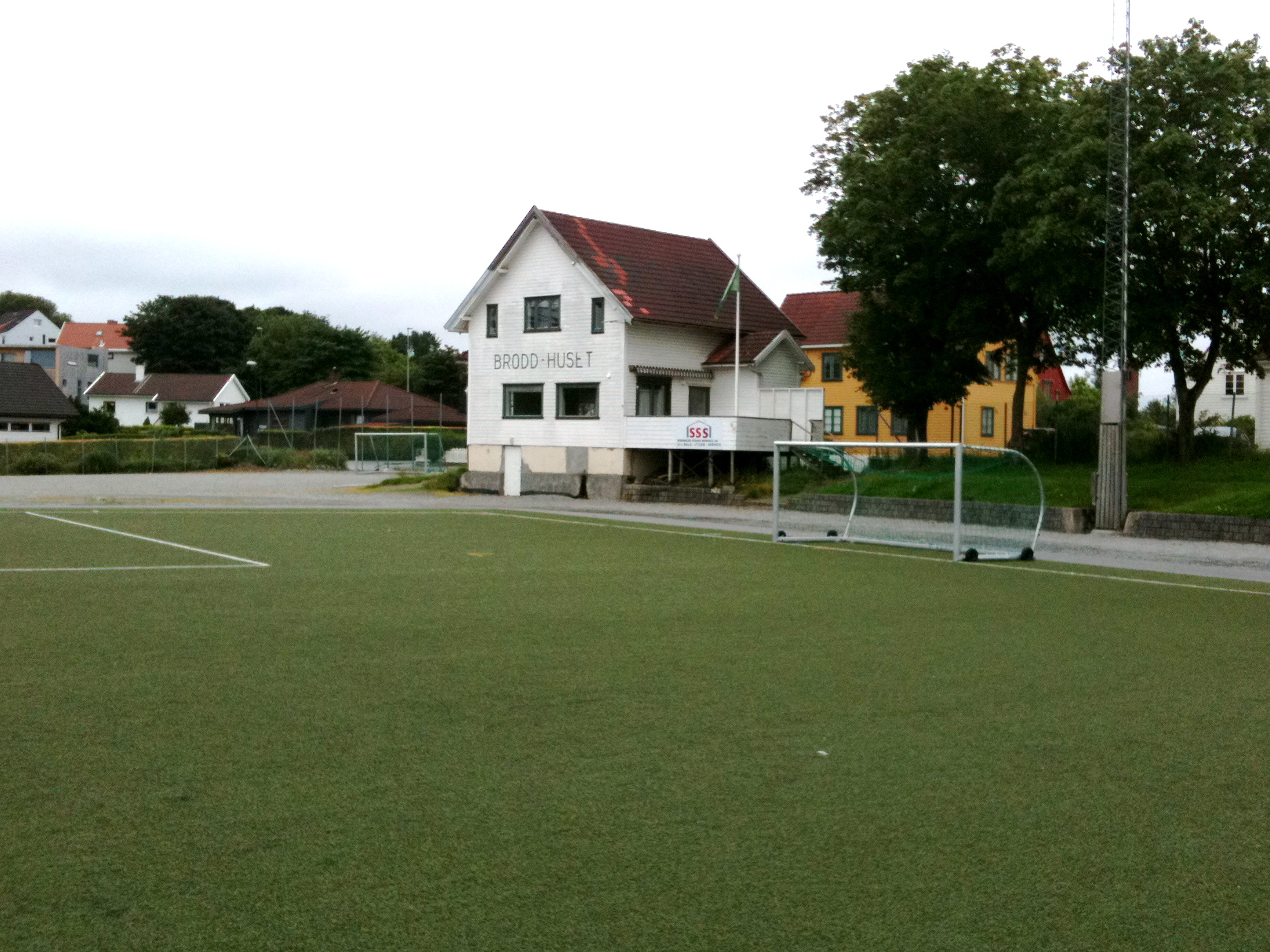 Broddhuset på Midjord i Stavanger